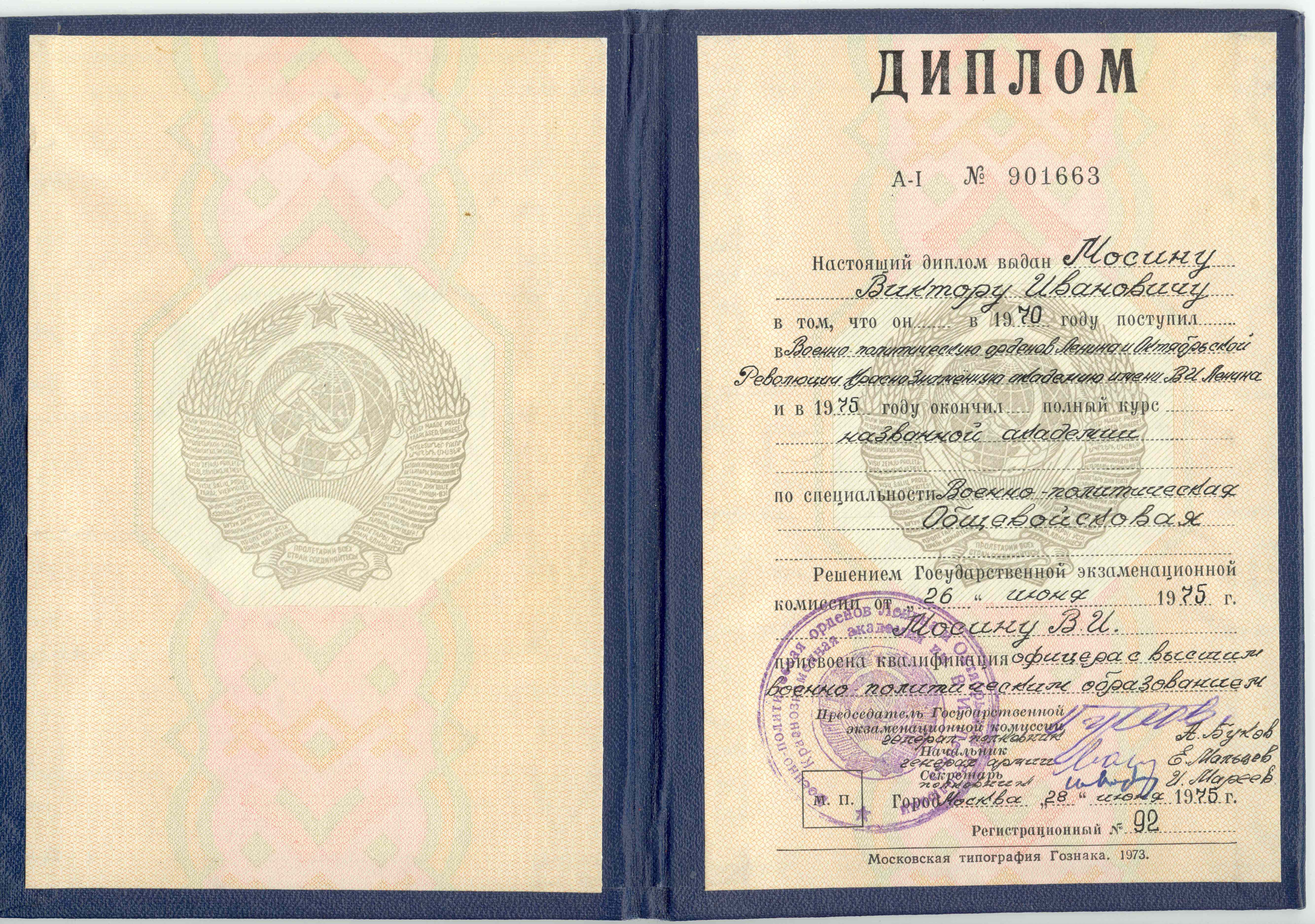 Диплом военно-политической академии имени В.И. Ленина